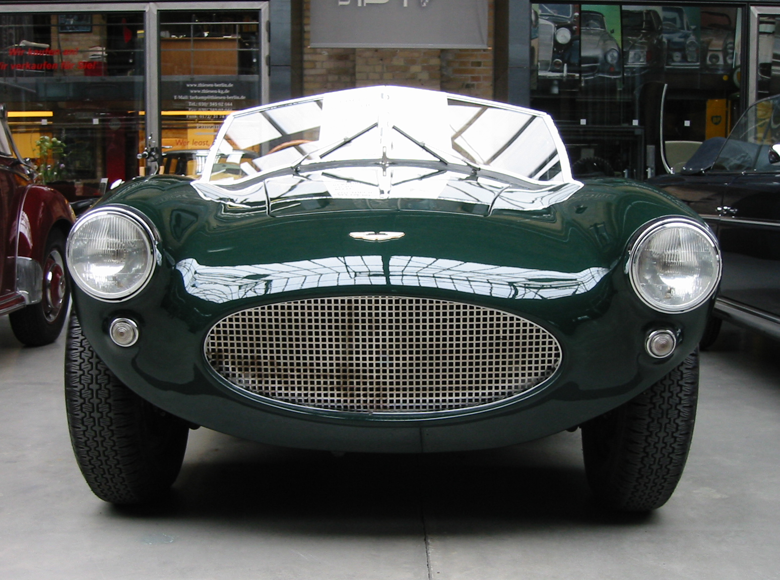 'Aston Martin DB1 SPA' Paul Jackman Special 1953/48, Frühjahr 2010 im Meilenwerk Berlin.